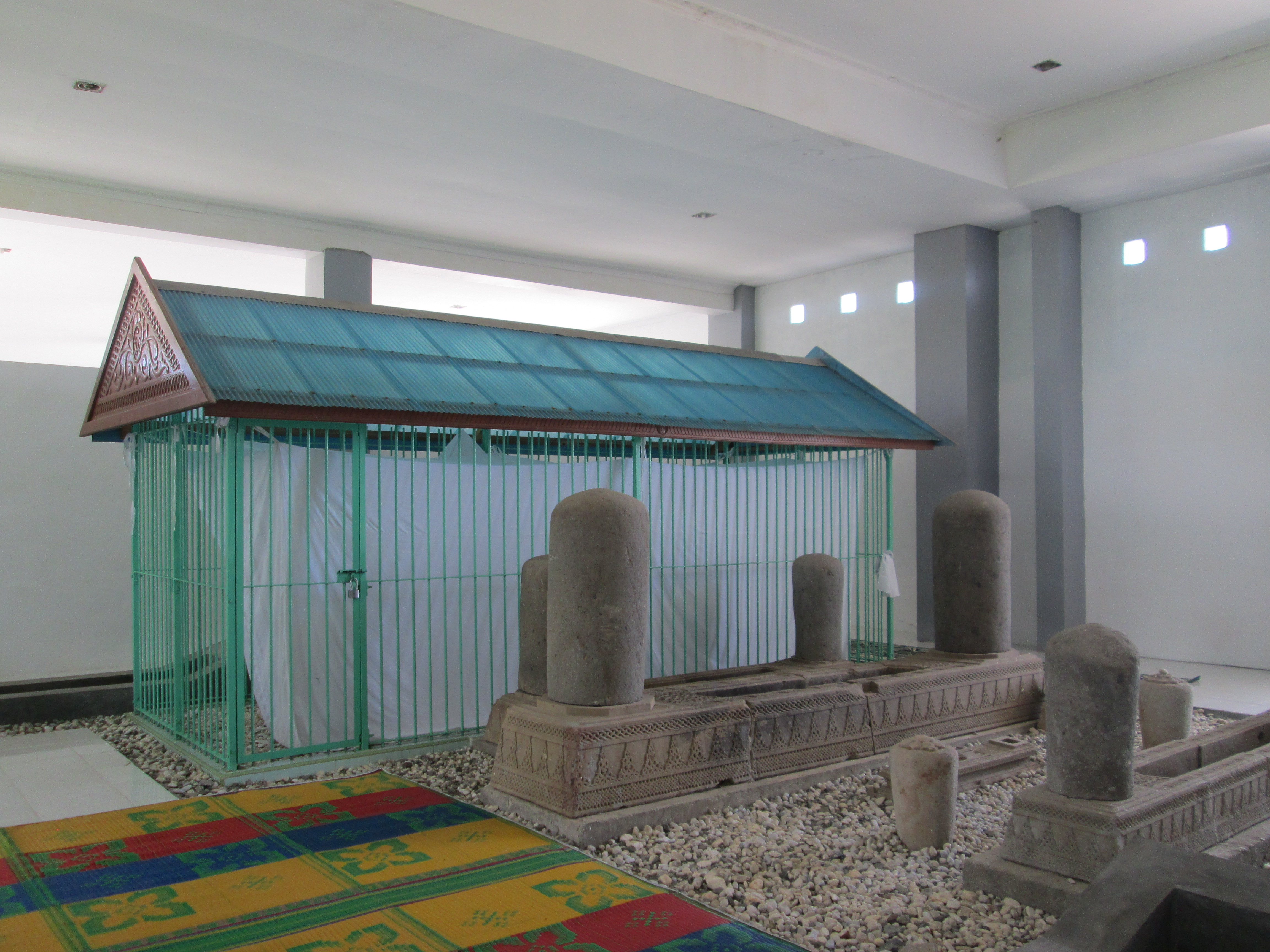 Makam Syaikh Abdurrauf al-Fansuri alias Syiah Kuala